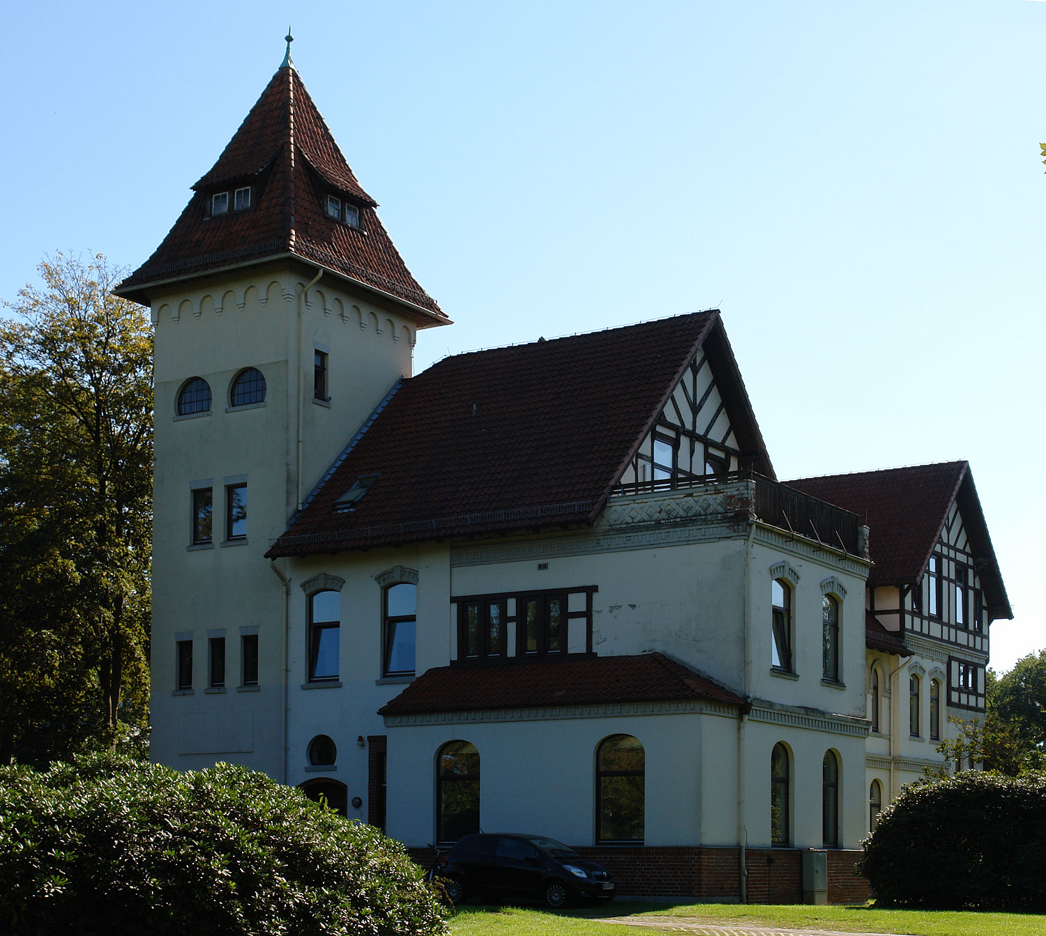 Klinikum Bremen-Ost, Haus 9. Ehemals St. Jürgen Asyl, Haus XI. Herstellung 1900–1904. Funktion: Verwaltungsgebäude Das abgebildete Objekt ist ein geschütztes Kulturdenkmal in der Freien Hansestadt Bremen, mit der Nr. 1667 beim Landesamt für Denkmalpflege registriert.